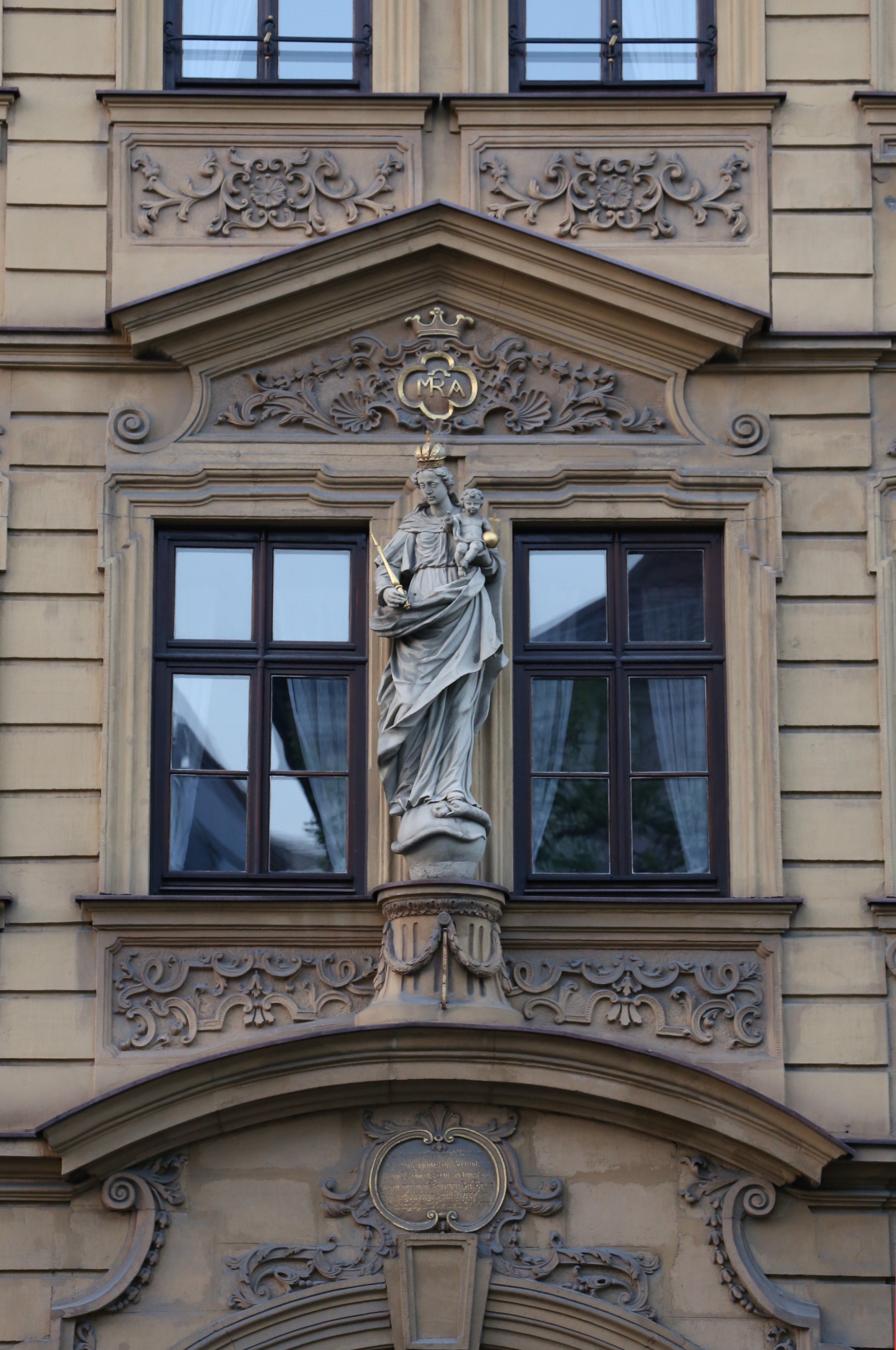 Neubaustraße 12, Würzburg; Bürgerhaus, ehemaliger Hof zum Roten Hahn, dreigeschossiger Mansarddachbau mit reicher Sandsteinfassade, Barock, Balthasar Neumann, bezeichnet 1734–1736, Wiederherstellung 1975–1979. Hausmadonna, Sandstein, Barock, Balthasar Esterbauer, 18. Jahrhundert